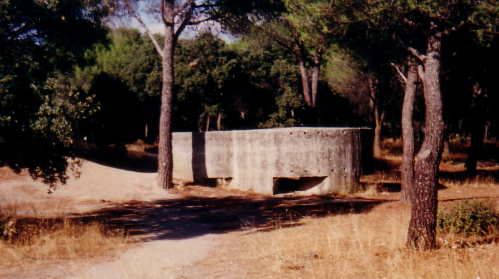 Foto tomada por Santiago Agueda Alonso Bunker de la Guerra Civil Española en La Dehesa de Navalcarbón de Las Rozas de Madrid. Digitalizada con un scanner AGFA, a partir de una foto tomada con una camara reflex YASHICA